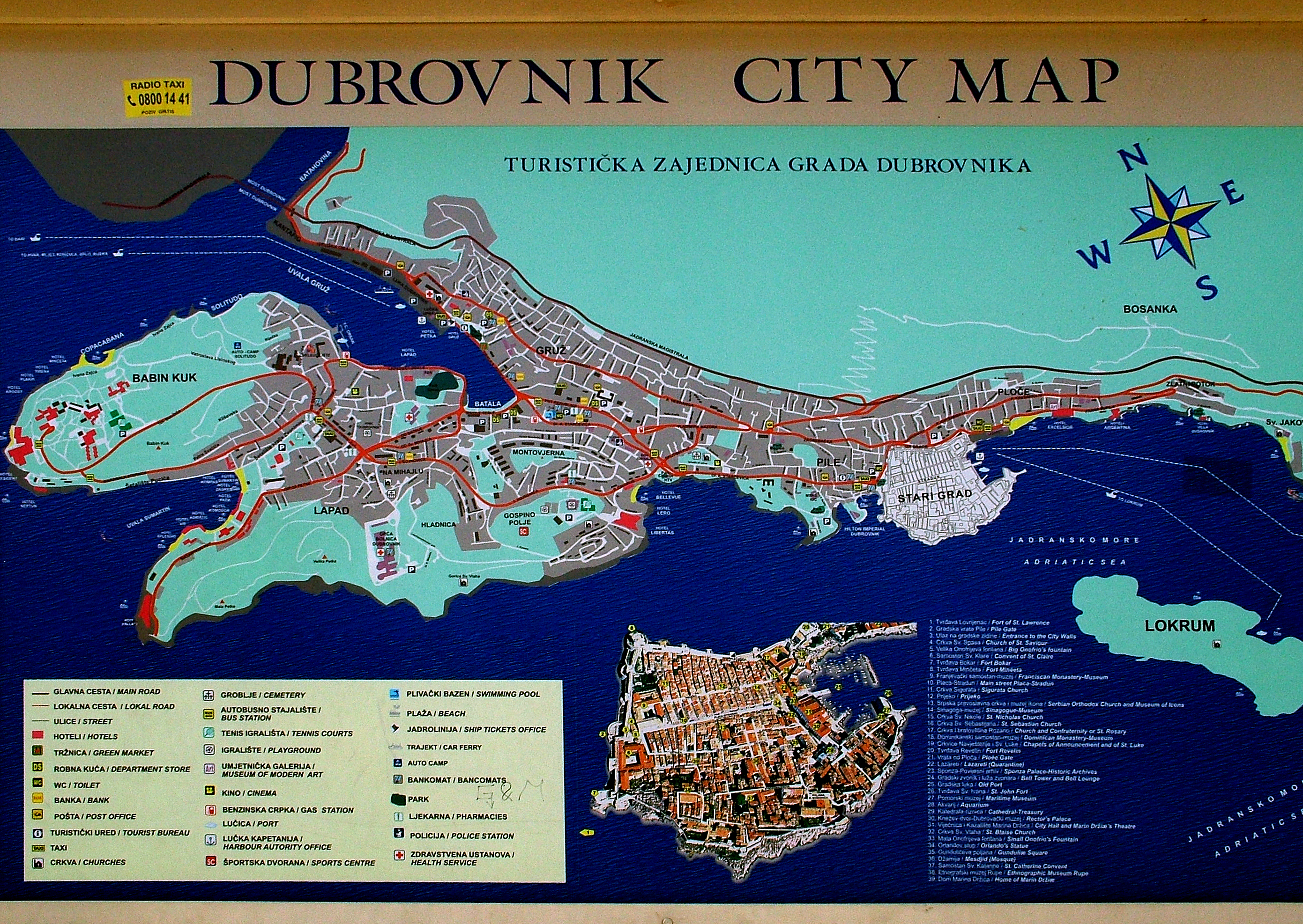 Dubrovniki turistainformációs tábla